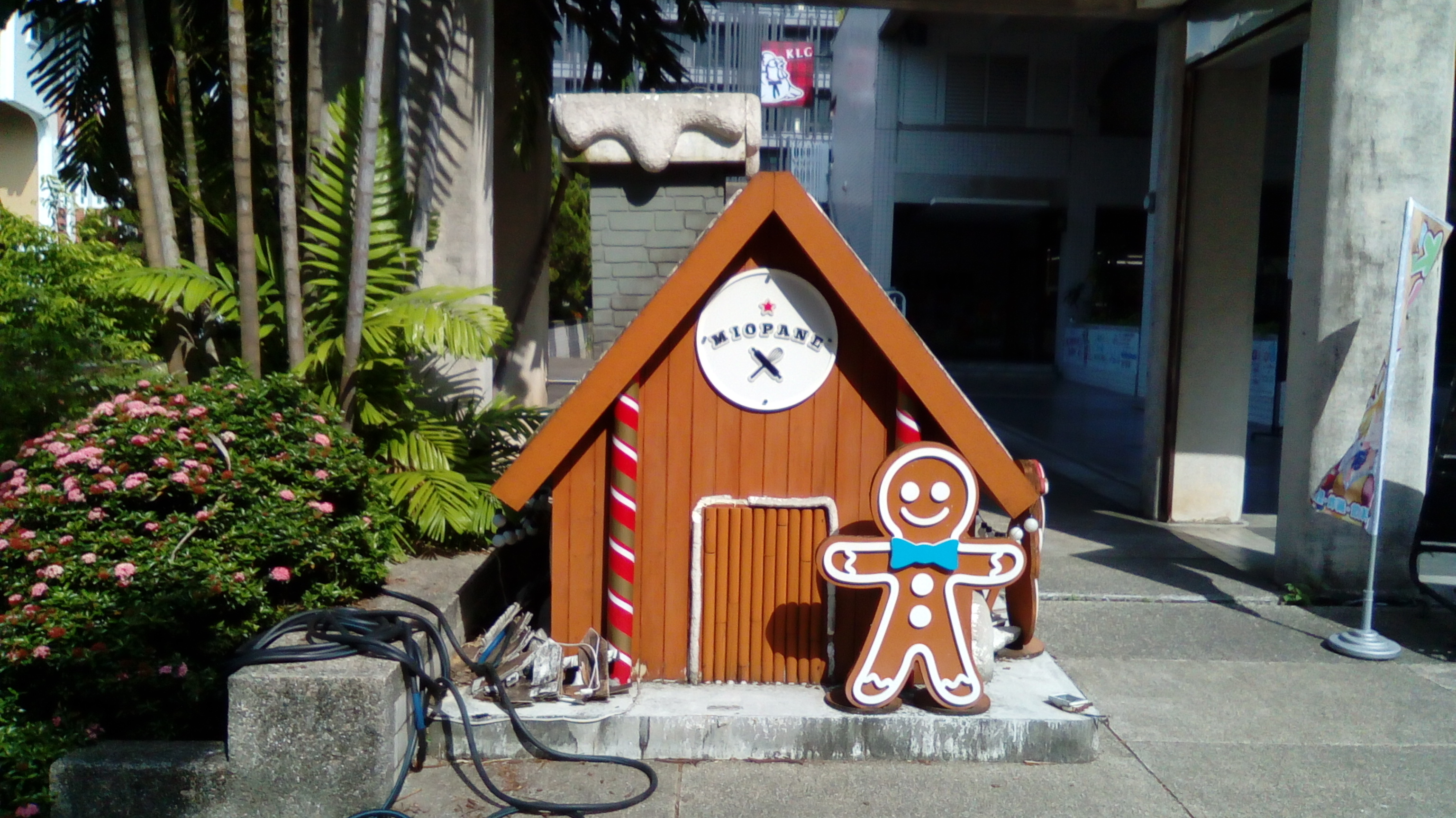 同上 位於肯德基及7-11前